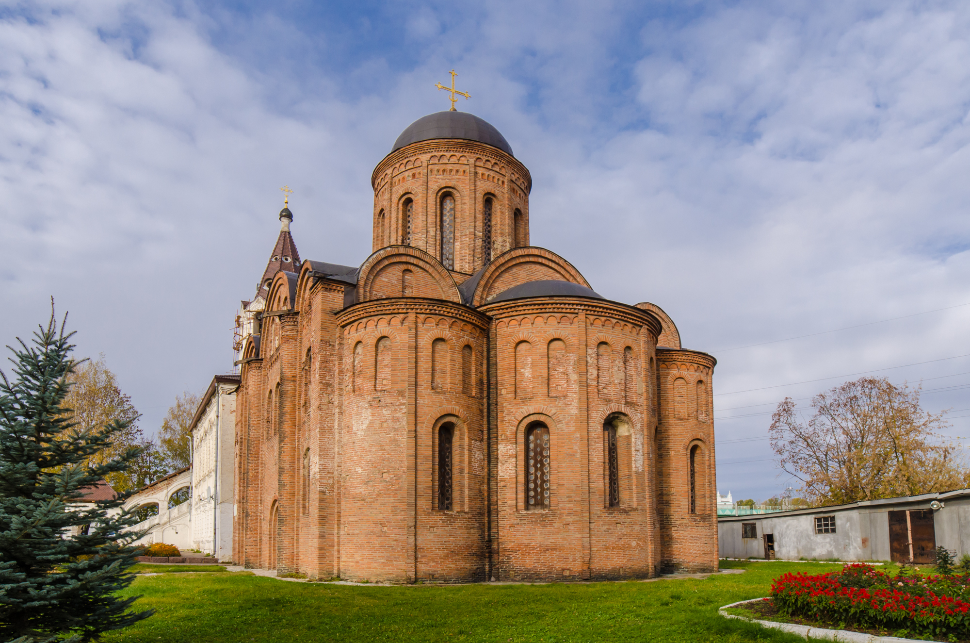 Церковь Петра и Павла (церковь Петропавловская с колокольней): улица Кашена, 20-а, Смоленск, Смоленский район, Смоленская область